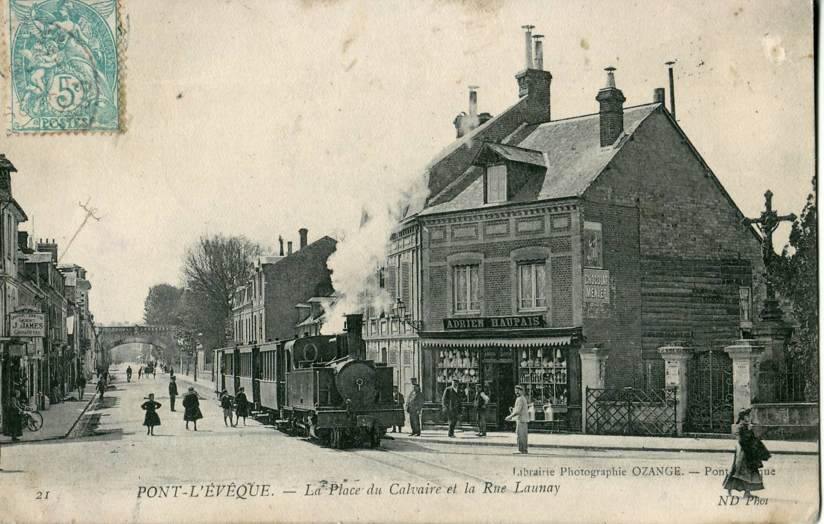 Carte postale ancienne éditée par ND Phot & Librairie Papeterie Ozange à Pont-L'Évèque, n°21 : PONT-L'ÉVÊQUE - La Place du Calvaire et la rue LaunayVue en gros plan d'une rame de la Compagnie du chemin de fer d'IL de Cormeilles à Glos Montfort et ext.